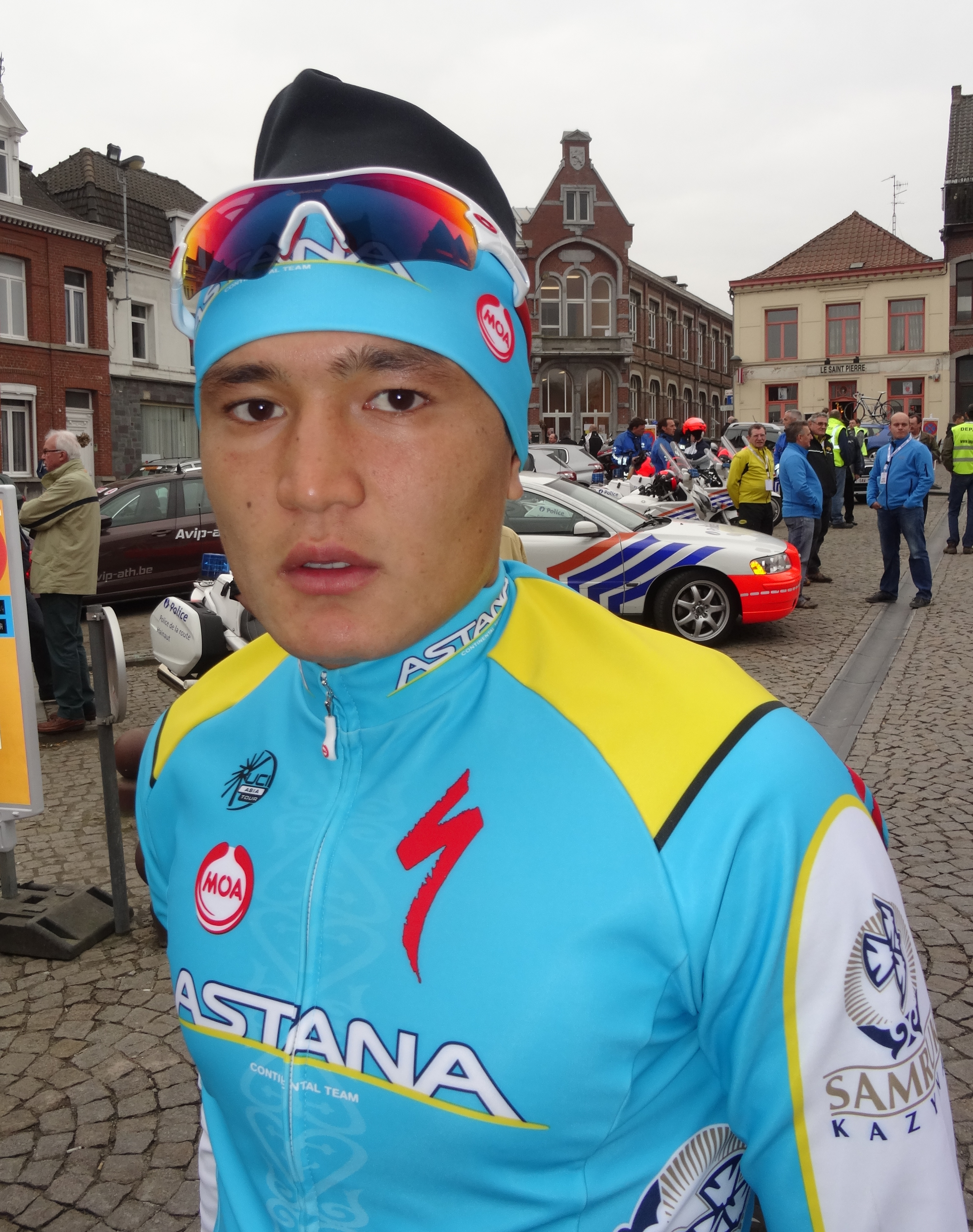 Triptyque des Monts et Châteaux 2014, étape 1, 4 avril 2014, départ d'Antoing. Depicted person: Nurbolat Kulimbetov Depicted team: Astana Continental The creation of these files was made possible thanks to the organizers of the Triptyque des Monts et Châteaux 2014 English | français | +/−